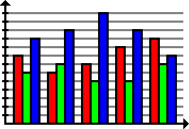 Exempel på ett stapeldiagram i PNG-format